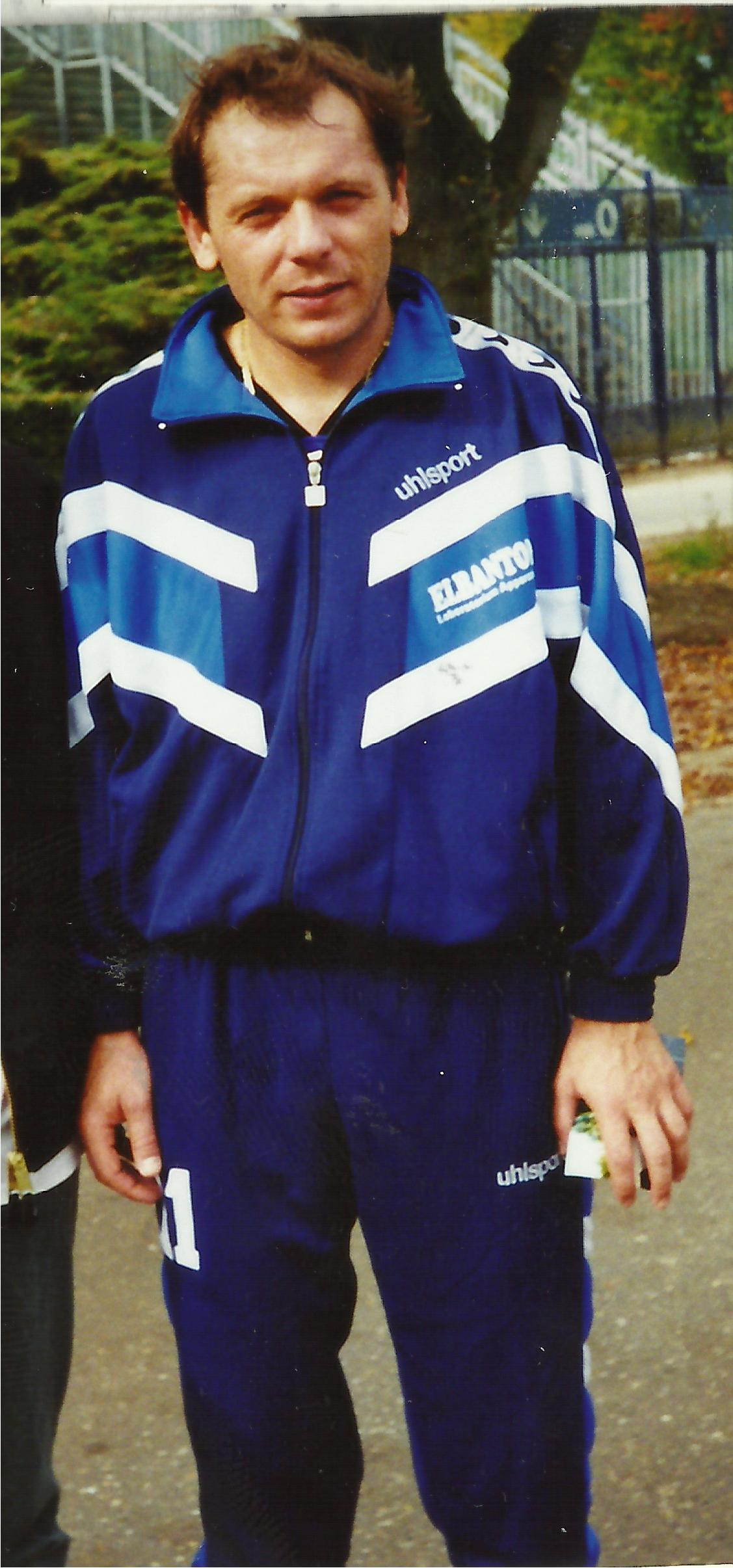 Jozsef is terug in Nederland bij FC Den Bosch en ik ga samen met me zwager na de training kijken na onze Jozsef Kiprich de antiheld uit zijn Feyenoord tijd.